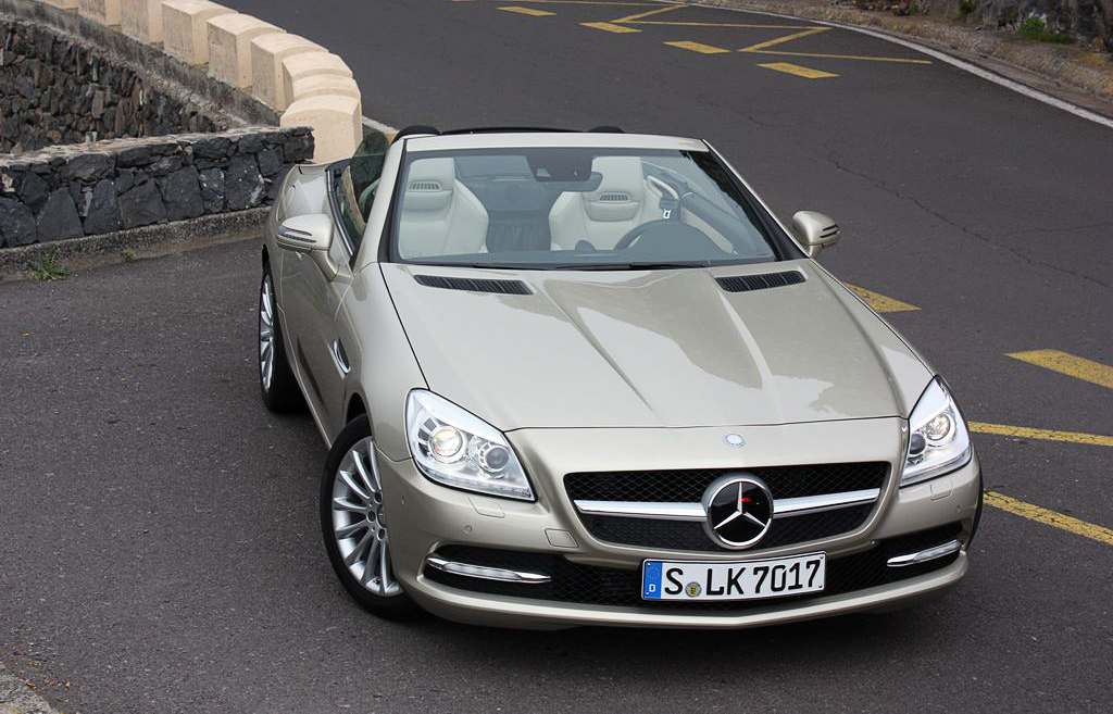 Mercedes-Benz SLK 250 BlueEFFICIENCY (R 172)